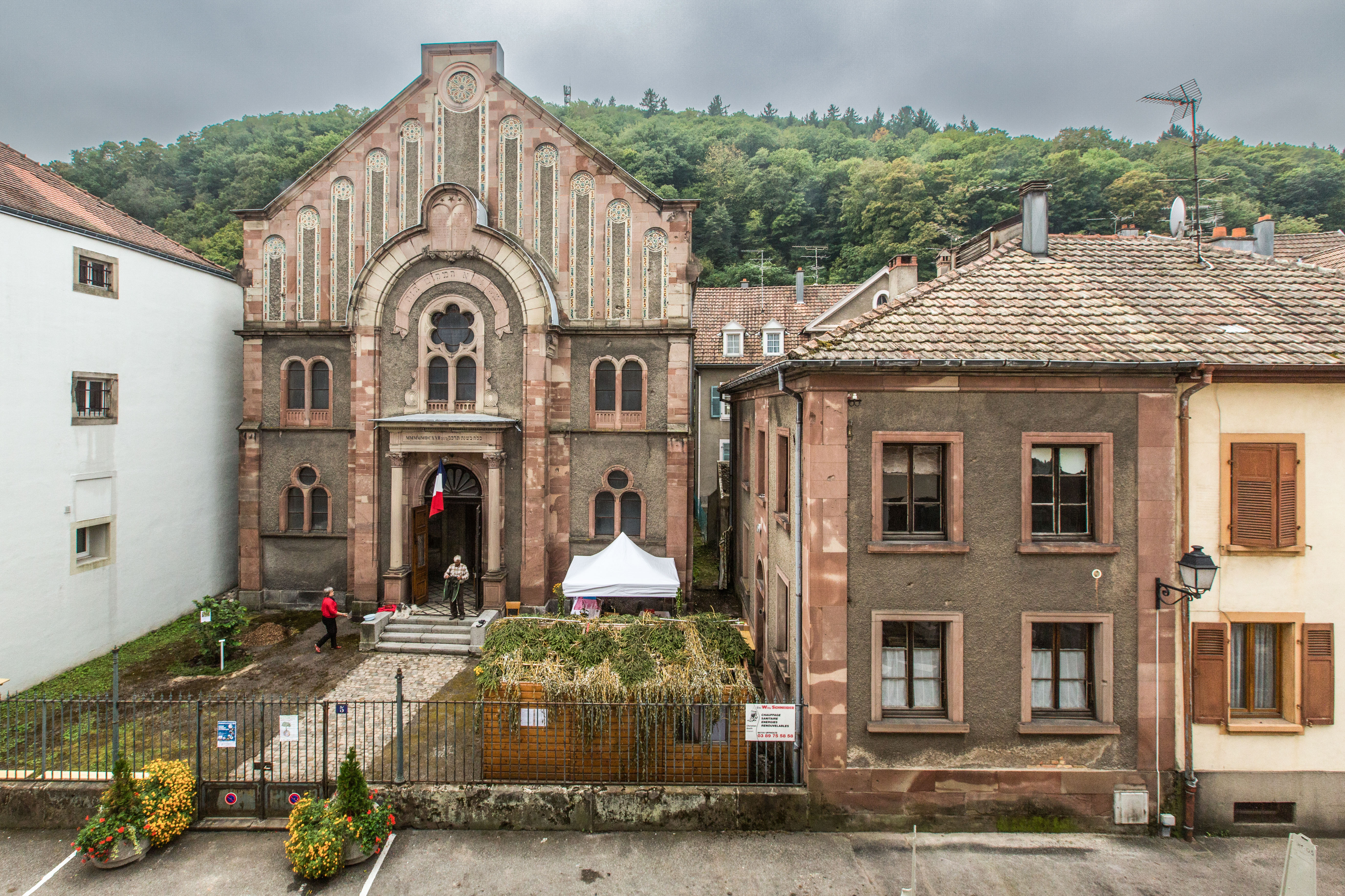 Thann (Haut-Rhin) la synagogue